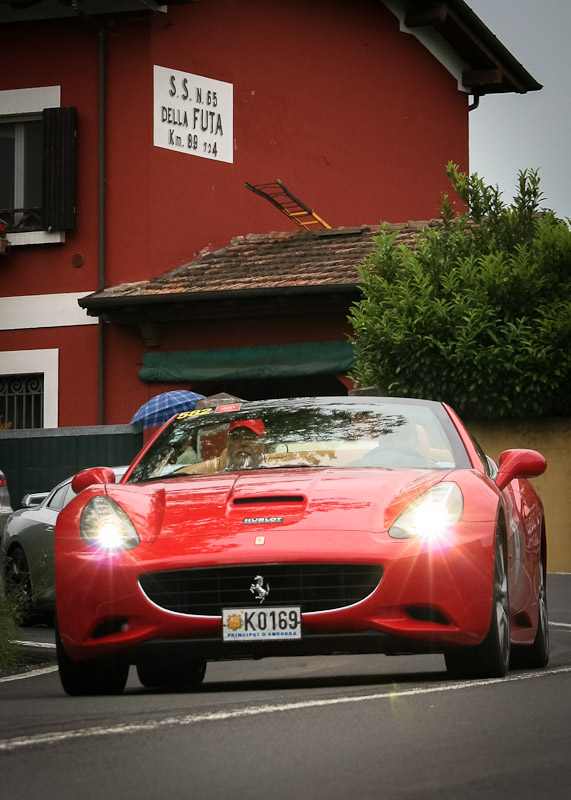 1000 miglia 2012 - SS della Futa . Pianoro (BO)